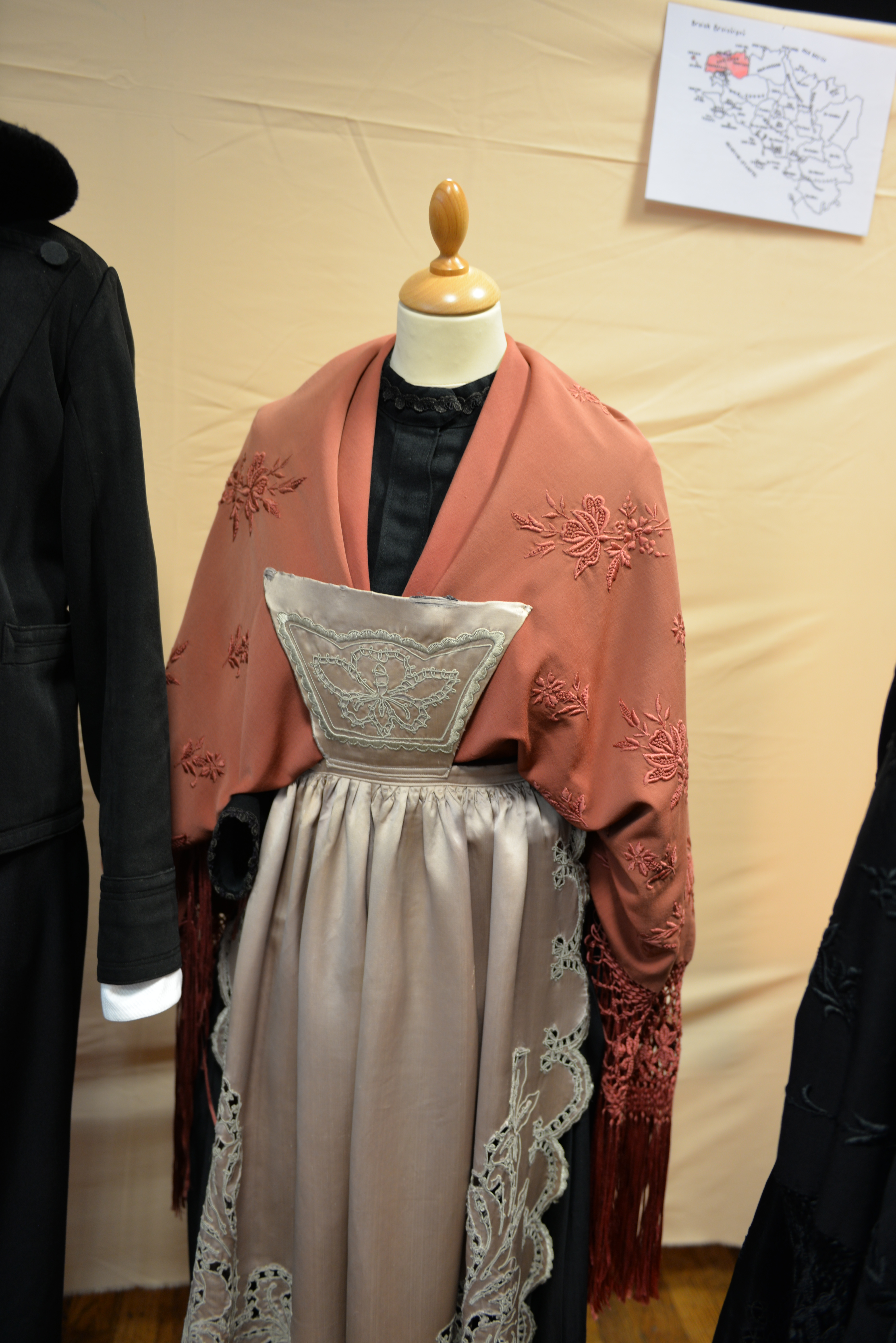 Costume Penn-Paket - Bas Léon - Femme